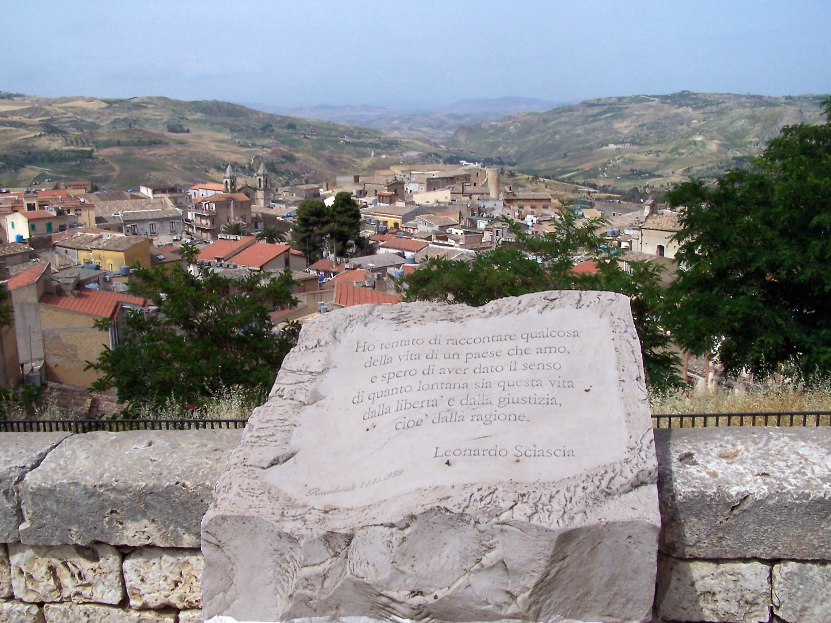 Libro aperto con le parole di Sciascia a Racalmuto (AG)